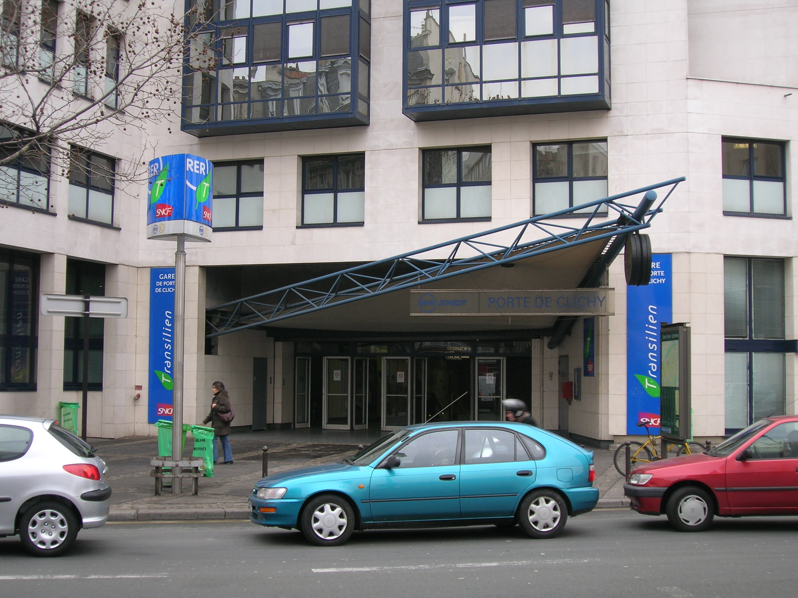 Entrée de la gare de la Porte de Clichy, sur la ligne C du RER, à Paris 17e, France.